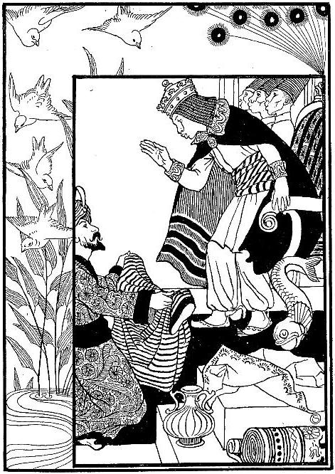 Arabian Nights illustration